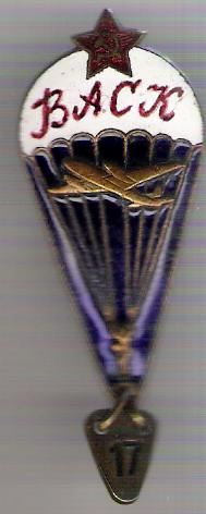 Parachute VASC